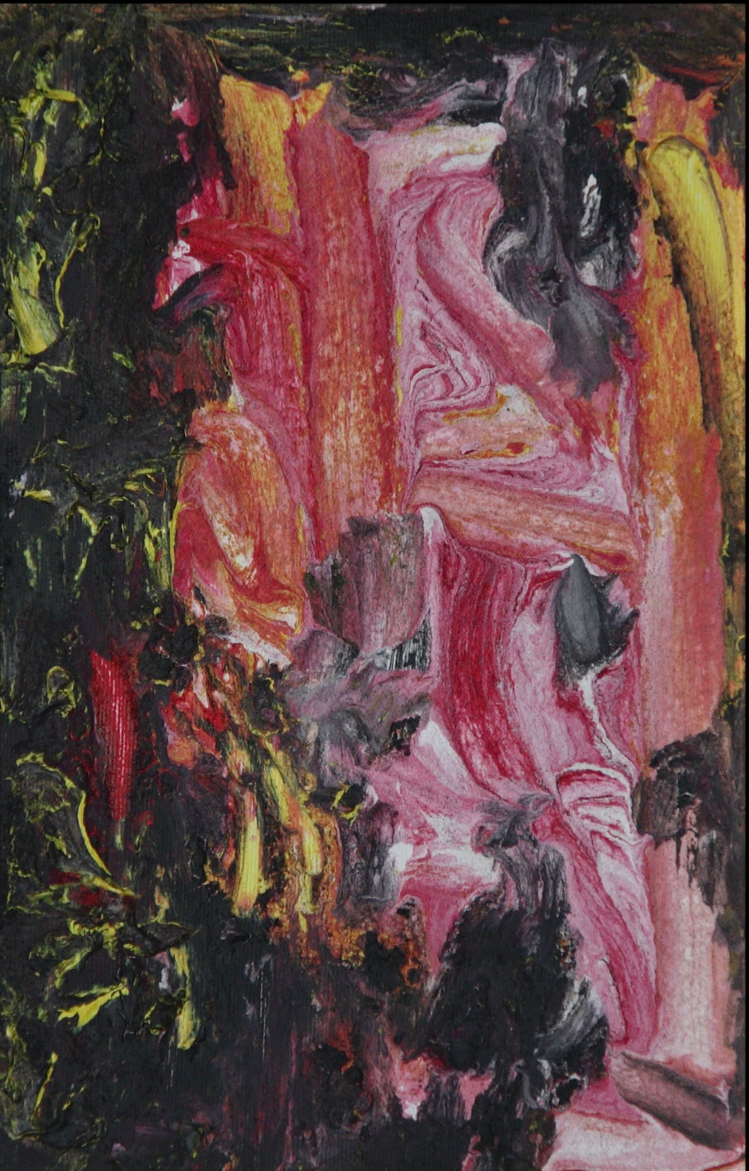 Acrilico su tela 30x20